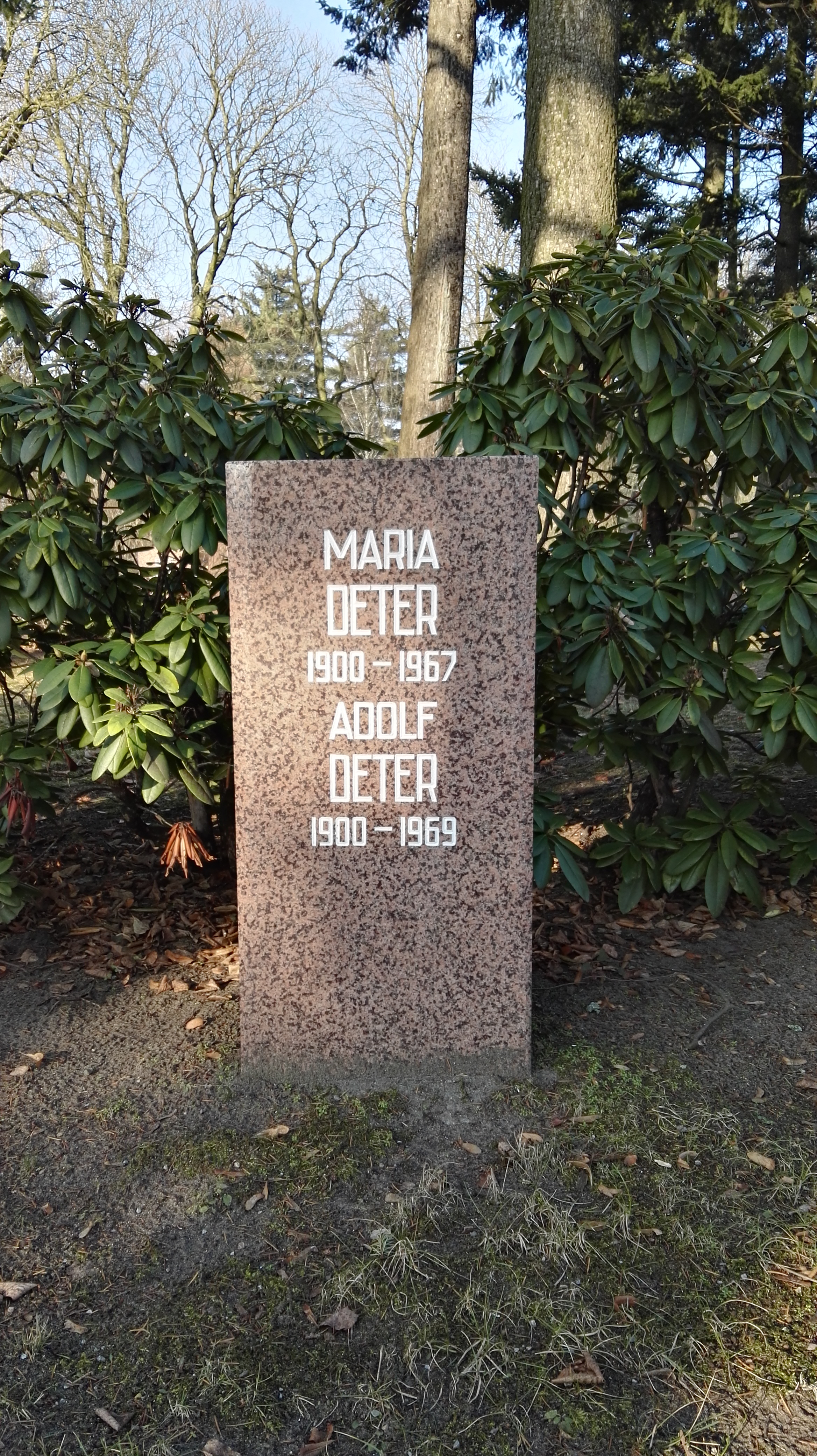 Grab von Adolf Deter und Maria Deter in der Grabanlage Pergolenweg auf dem Sozialistenfriedhof des Zentralfriedhofs Friedrichsfelde